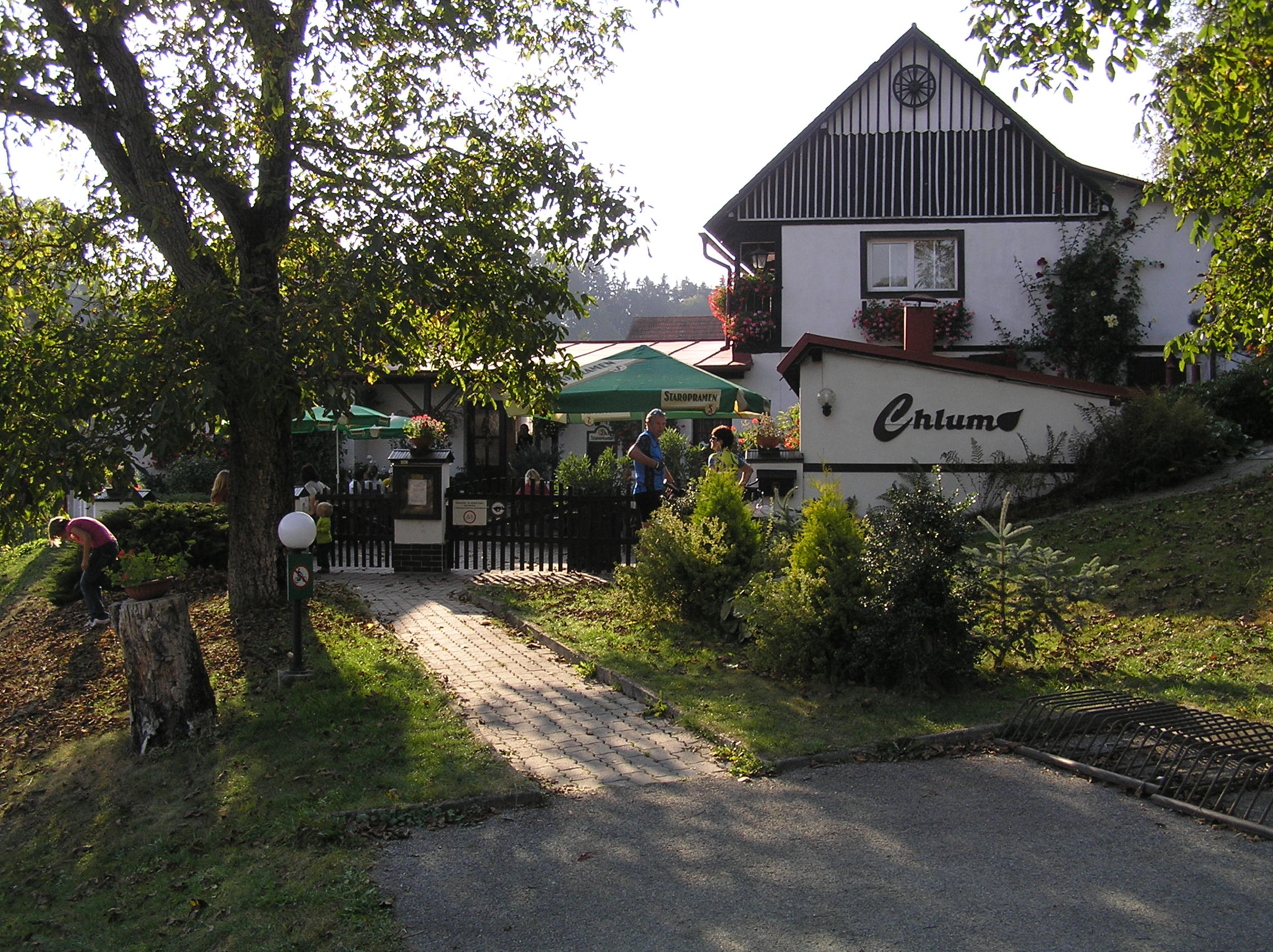 Lažany u Vyskře - výletní hostinec čp. 7 v osadě Chlum